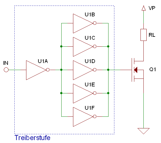 Gate-Treiber mit Logikgatter